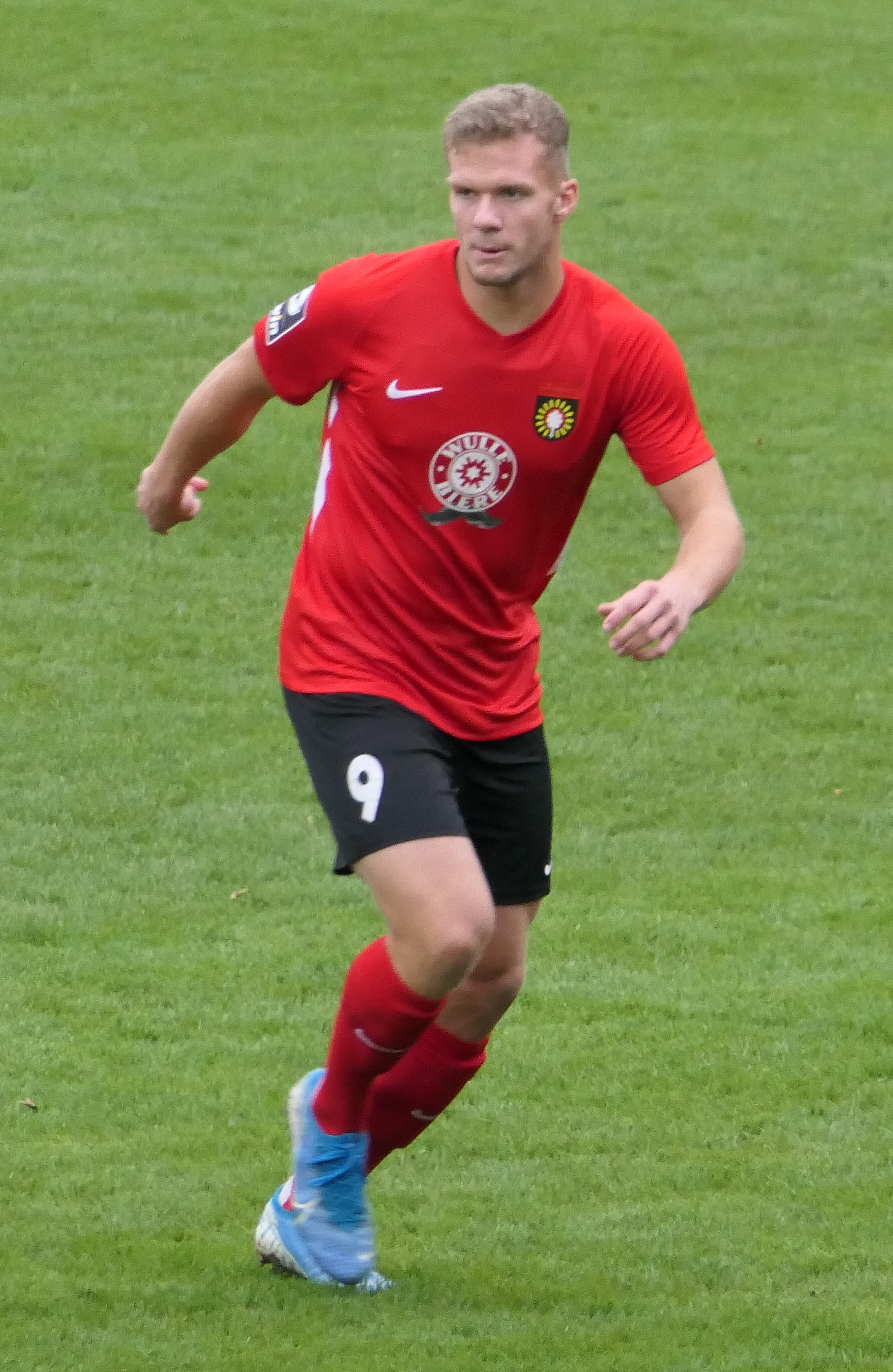 Der Fussballprofi Erid Hottmann im Trikot der SG Sonnenhof Großaspach beim Heimspiel gegen Eintracht Braunschweig am 27.10.2019.